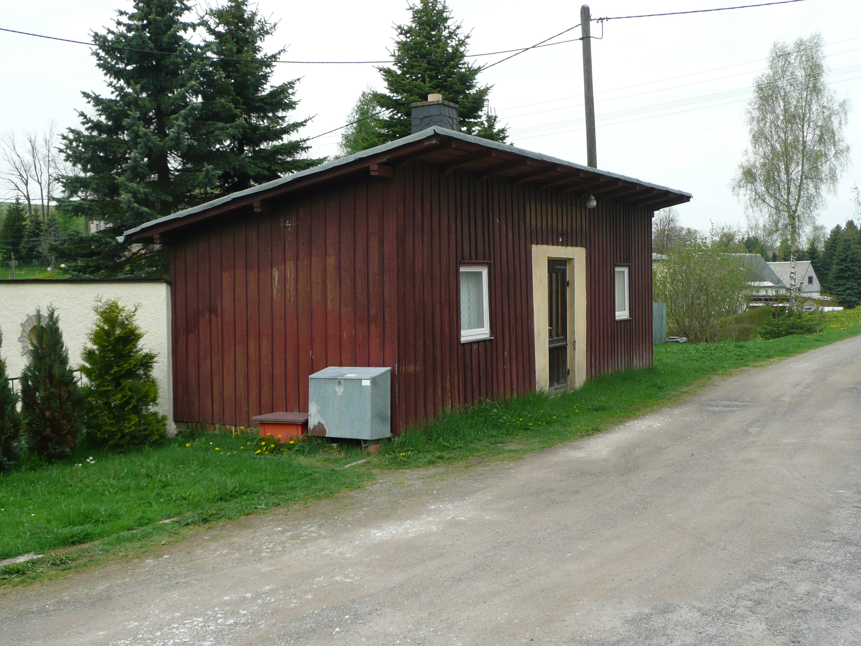 Foto der erhaltenen Wartehalle Friedersdorf